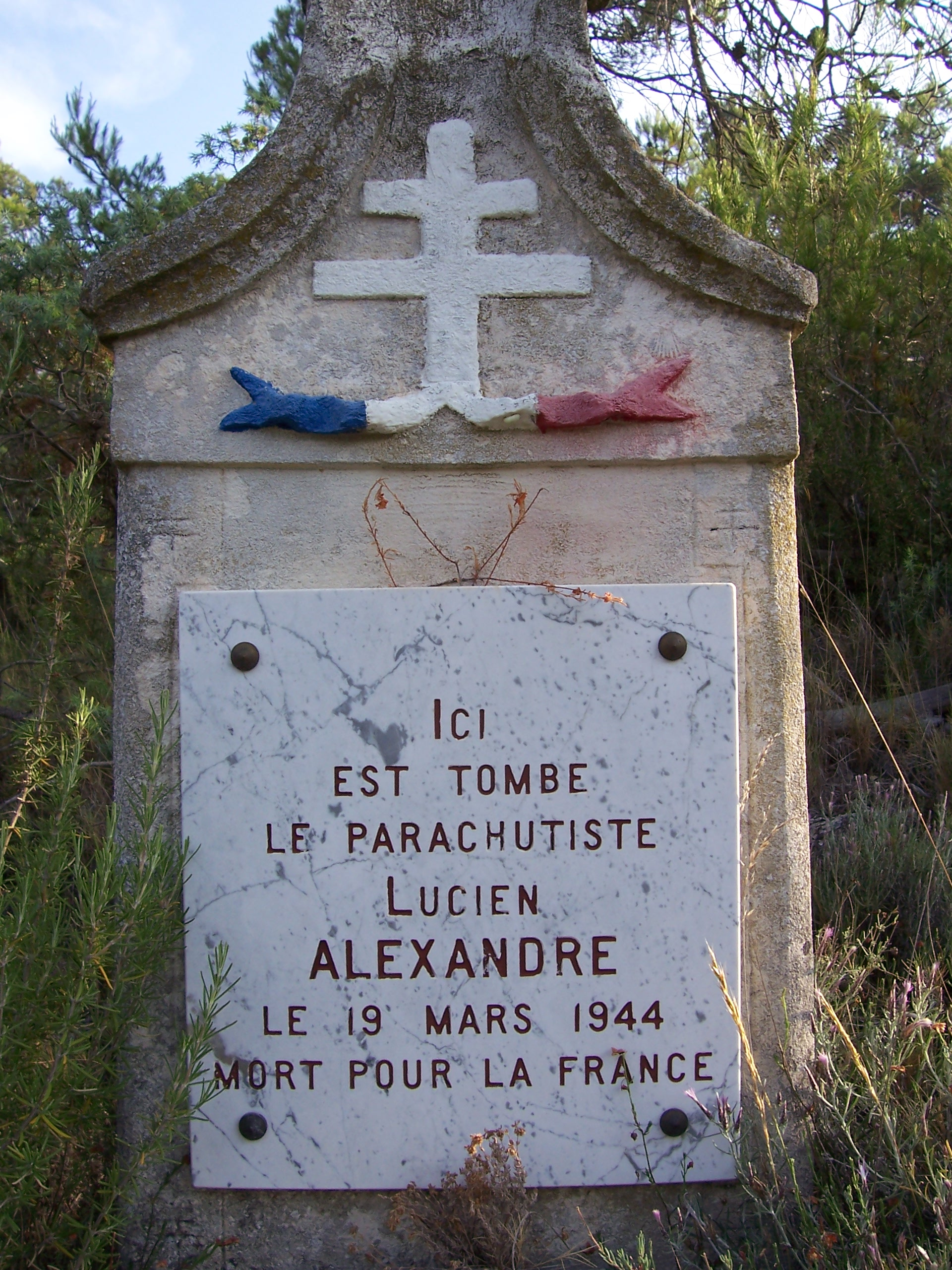 stèle de l'aviateur Lucien Alexandre au vallon de Christol